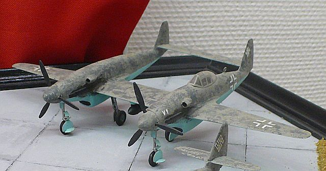 Me 609 Modell, eigenes Bild